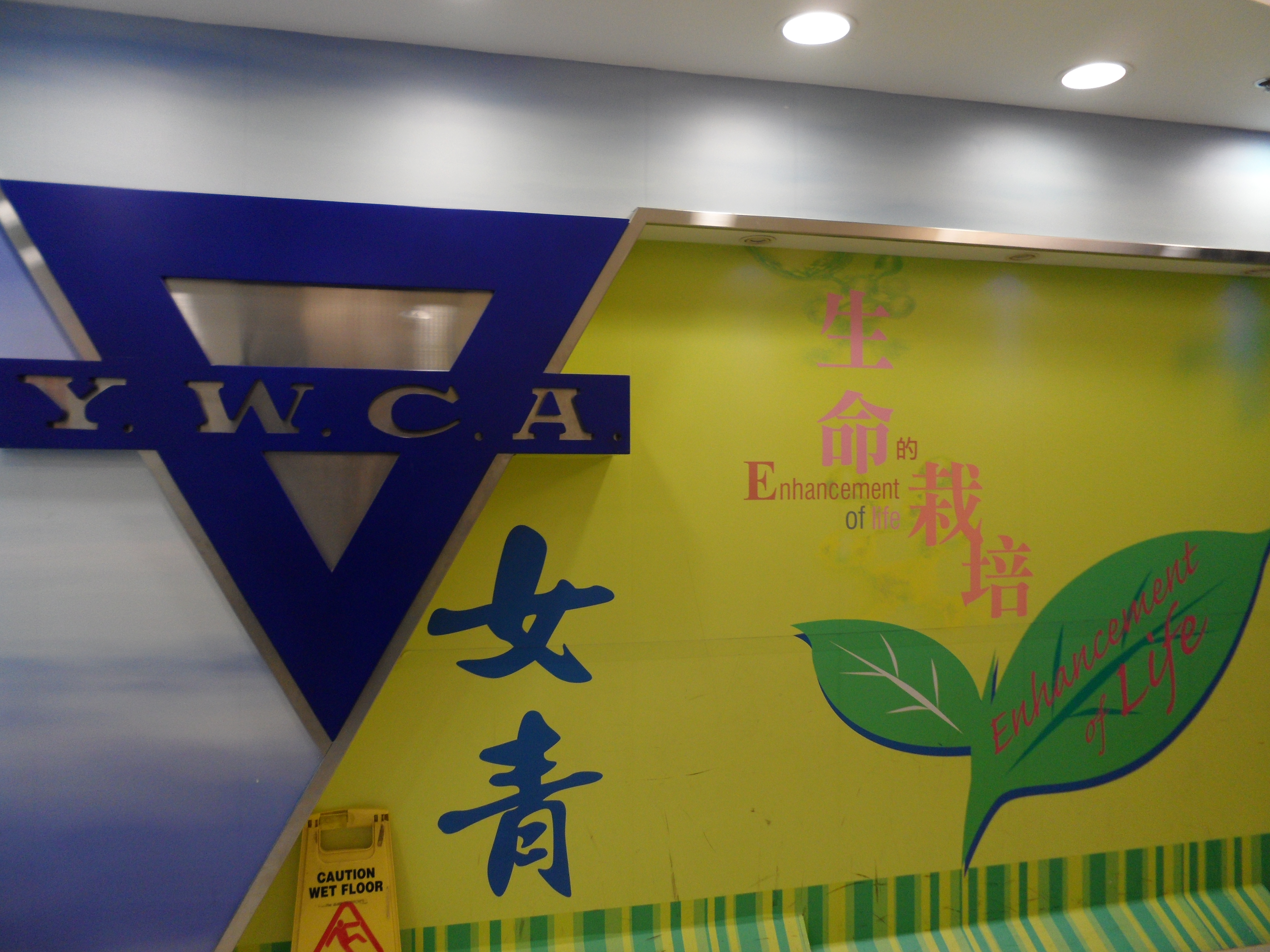 香港基督教女青年會 (深水埗元州街)